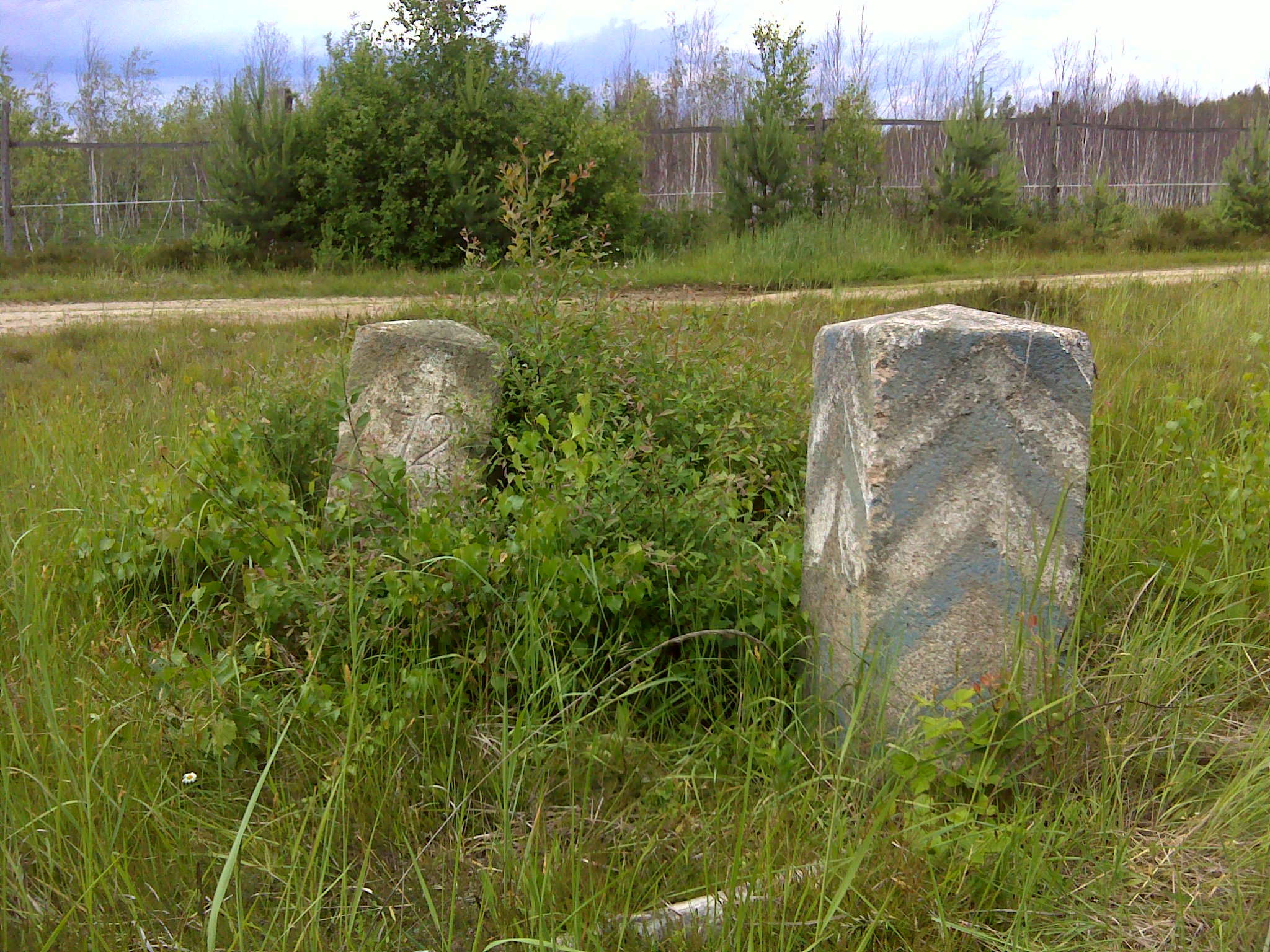 Historischer Grenzstein Nr. 72 der sächsisch-preußischen Grenze 1815 Hornjoserbsce: Historiski saksko-pruski měznik čo. 72 w holi mjez Stróžu a Dubom